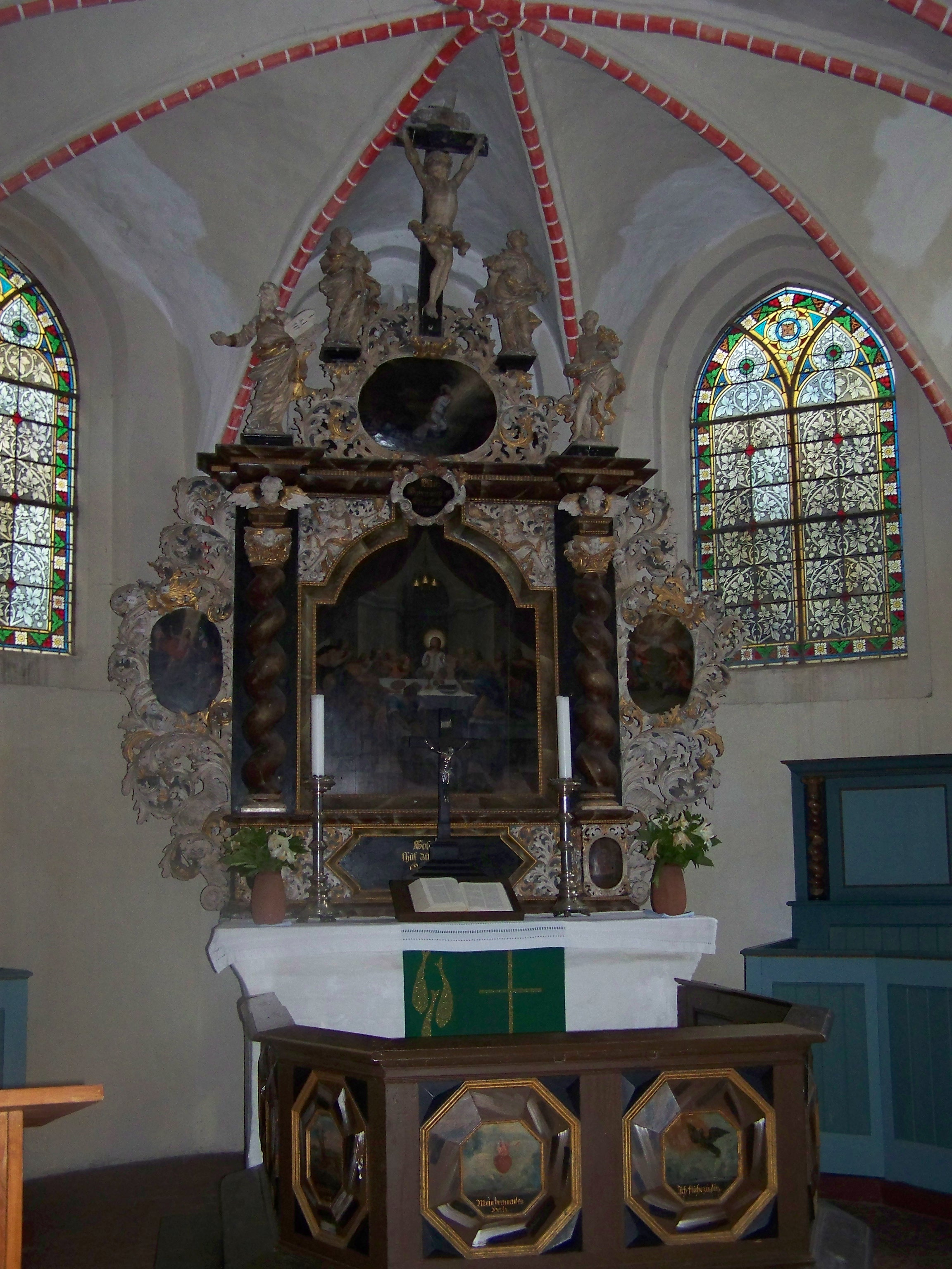 Zudar, St.-Laurentius-Kirche, Altar